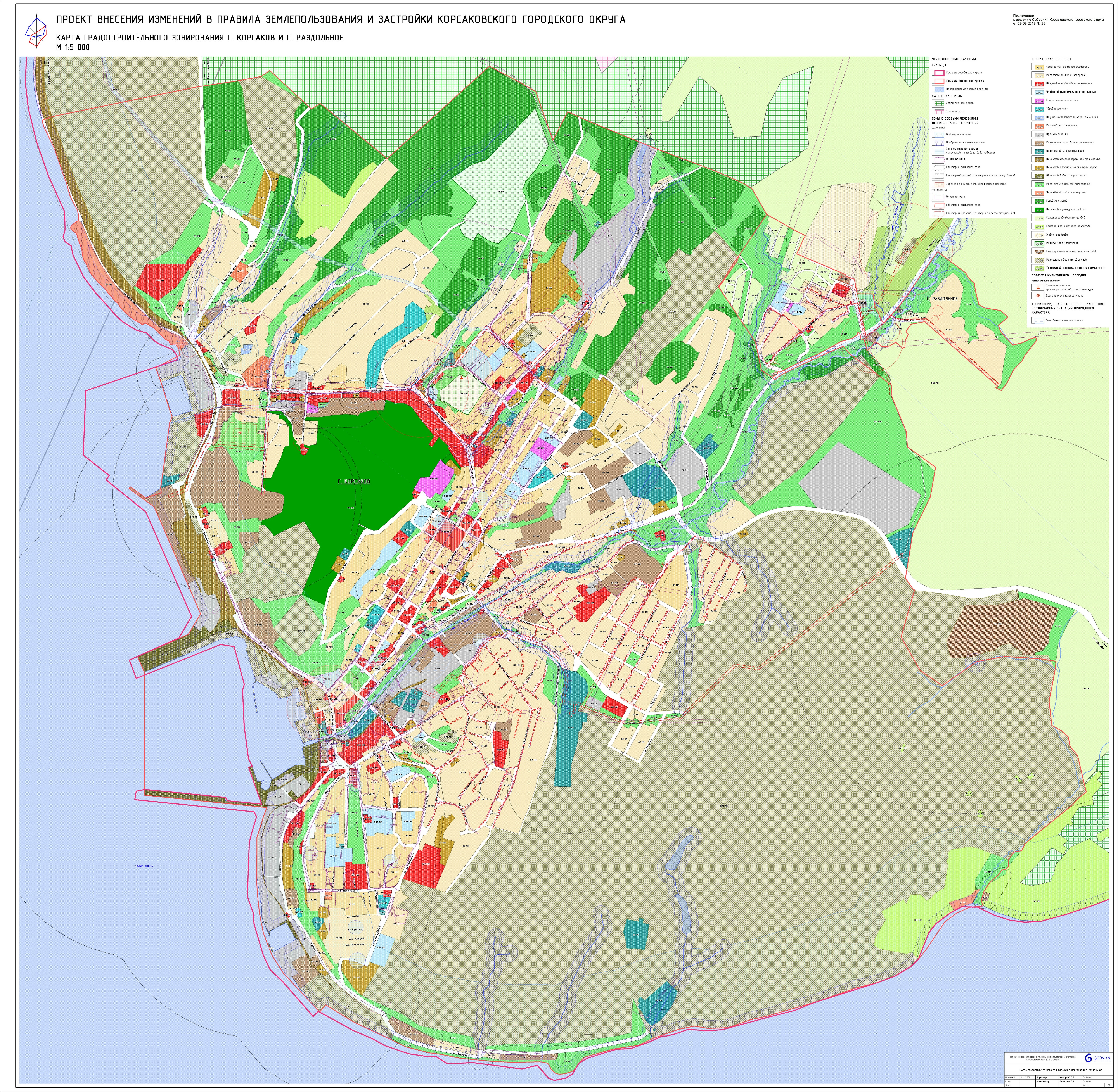 Карта градостроительного зонирования г. Корсаков (Приложение к решению Собрания Корсаковского городского округа от 29.03.2018 № 26), с указанием названий улиц